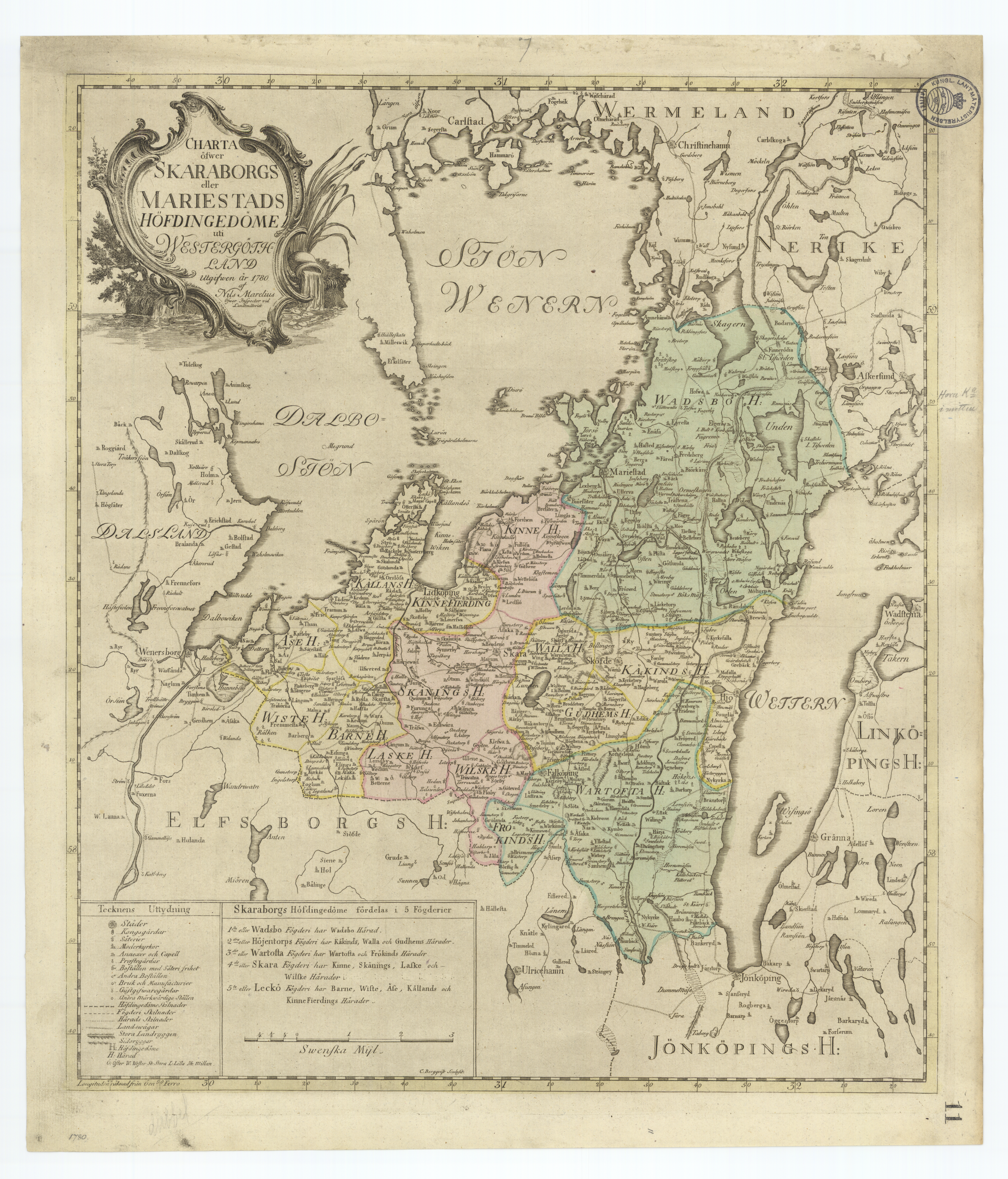 Generalkarta över Skaraborg, skapad 1780 av Kungliga Lantmäteriet (Nils Marelius).